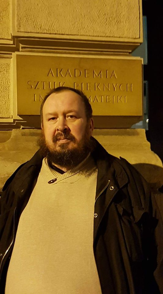 Robert Znajomski